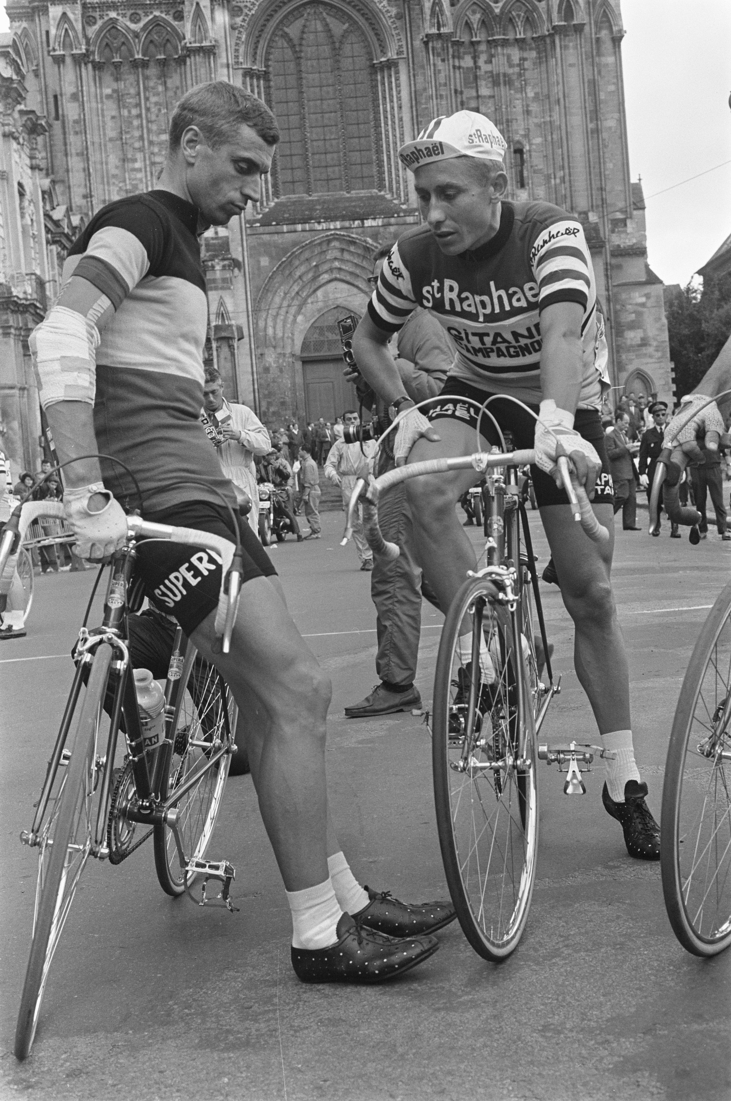 Collectie / Archief : Fotocollectie Anefo Reportage / Serie : Tour de France 1964 Beschrijving : 51ste Tour de France 1964. Vertrek ui Lisieux, Anqueti in gesprek Van Looy Datum : 23 juni 1964 Locatie : Frankrijk, Lisieux Trefwoorden : gesprekken, sport, vertrekken, wielrennen Persoonsnaam : Anquetil, Jacques, Looy, Rik van Fotograaf : Harry Pot / Anefo Auteursrechthebbende : Nationaal Archief Materiaalsoort : Negatief (zwart/wit) Nummer archiefinventaris : bekijk toegang 2.24.01.05 Bestanddeelnummer : 916-5812